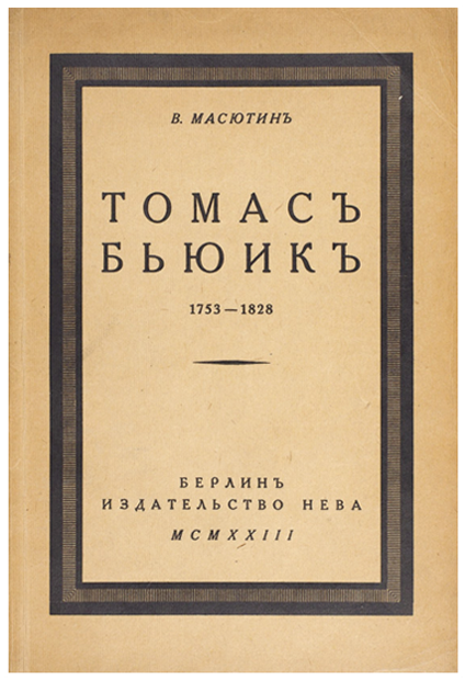 Обложка книги. Автор — В. Н. Масютин. «Томас Бьюик». Берлин 1923 год.